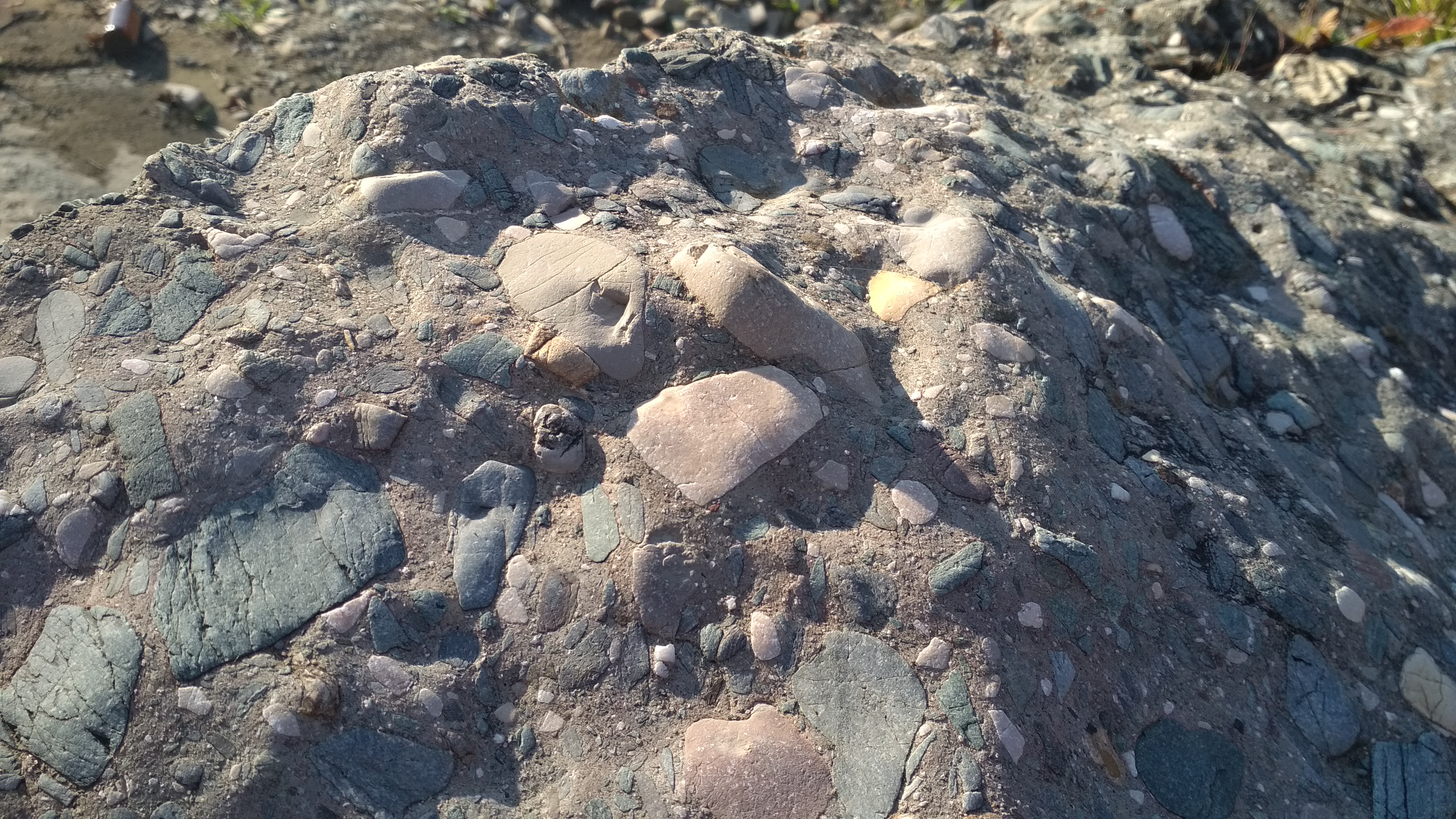 Вигляд плити